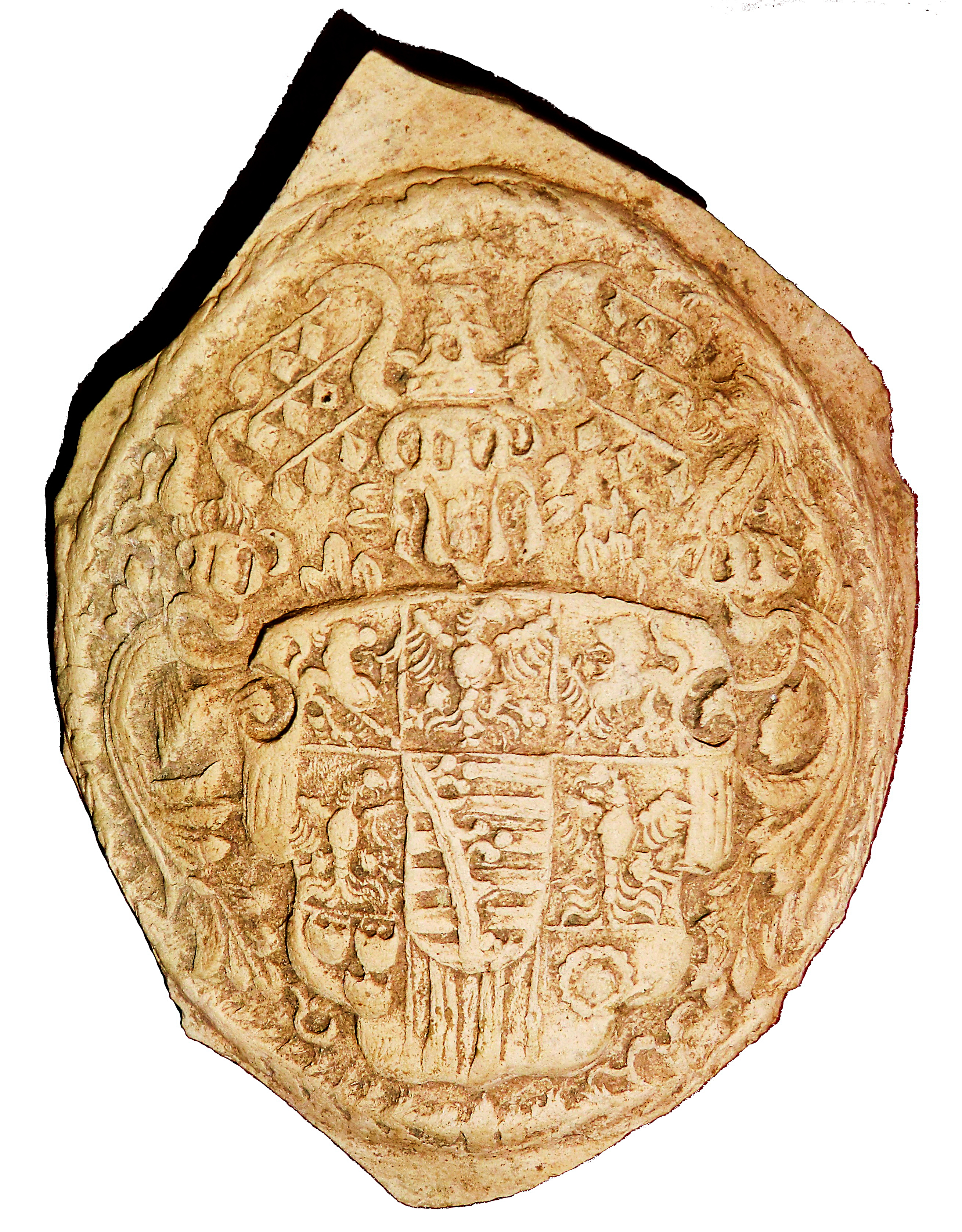 Krugfragment mit großem Wappen aus Gschaid